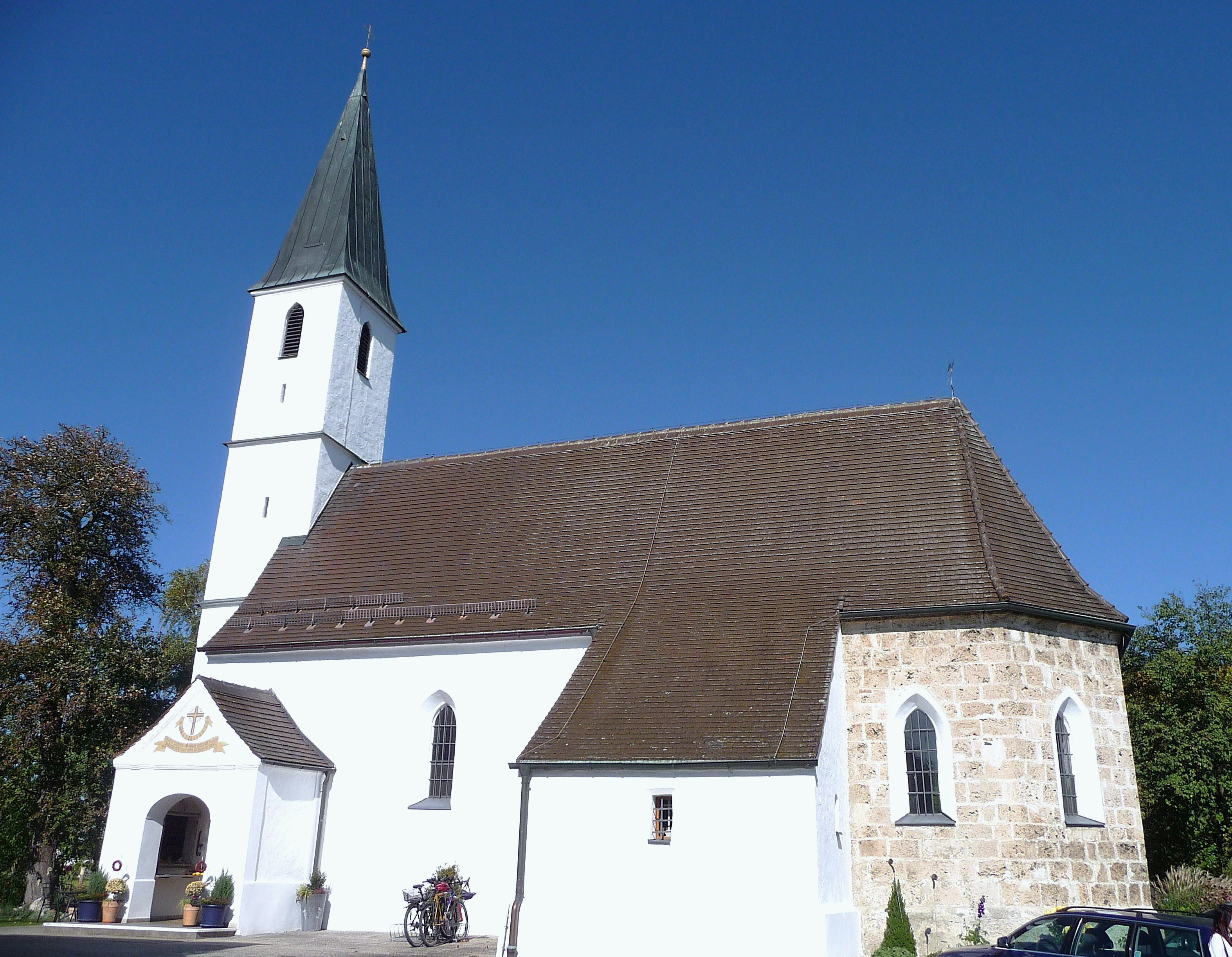 Die Filialkirche St. Johannes d. T. in Teising